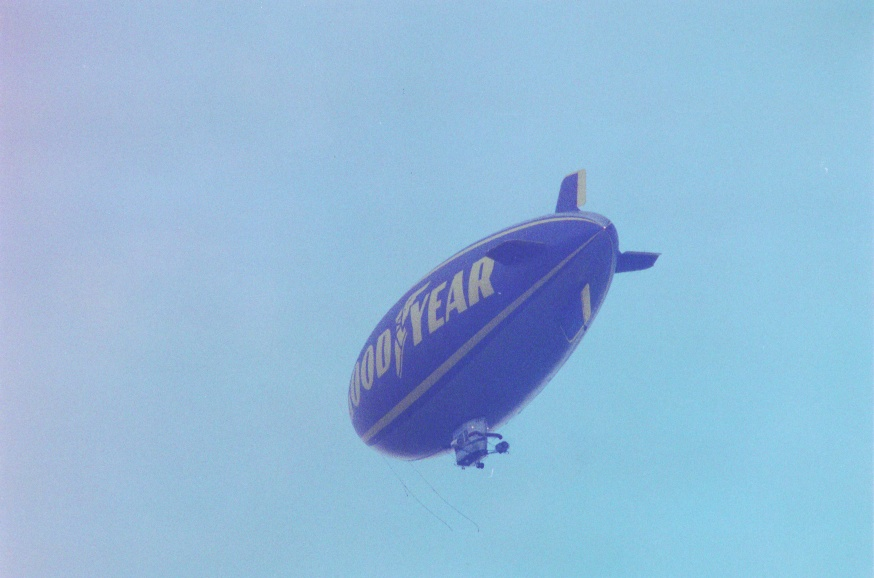 Dirigeable GoodYear passant au dessus de Boussu-Bois.JPG